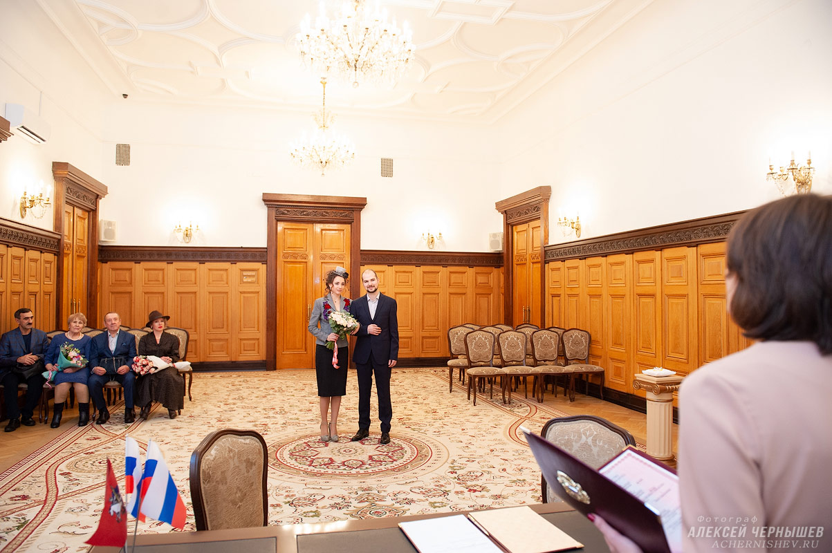 Свадьба в Грибоедовском ЗАГСе